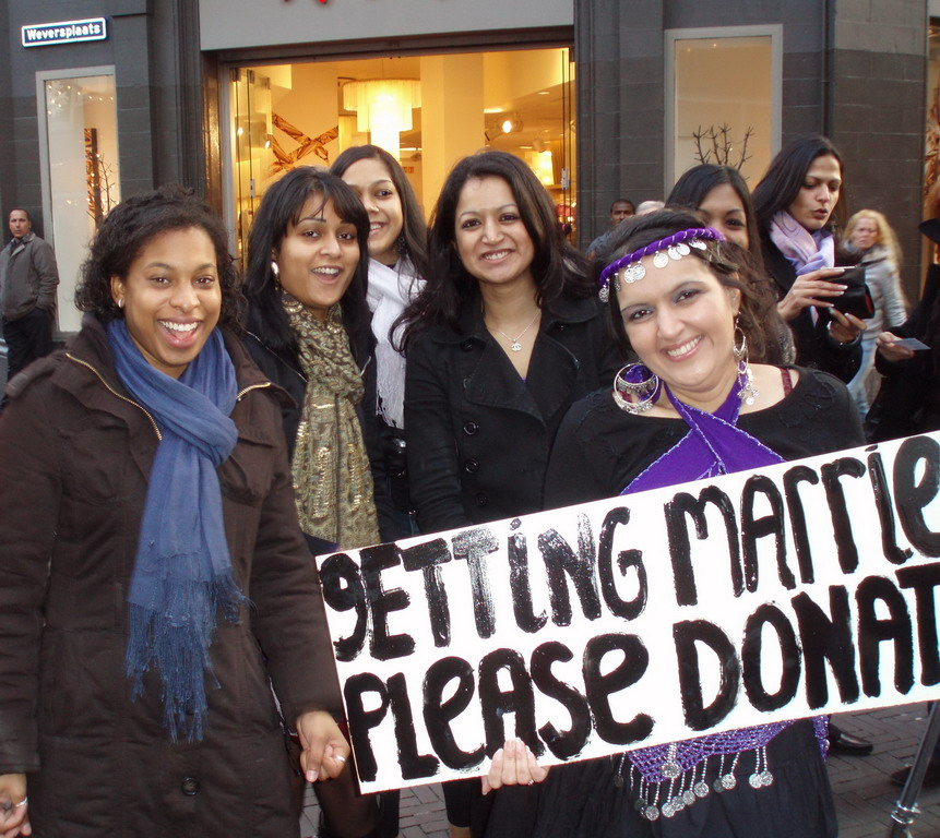 Venusstraat/Weversplaats Den Haag